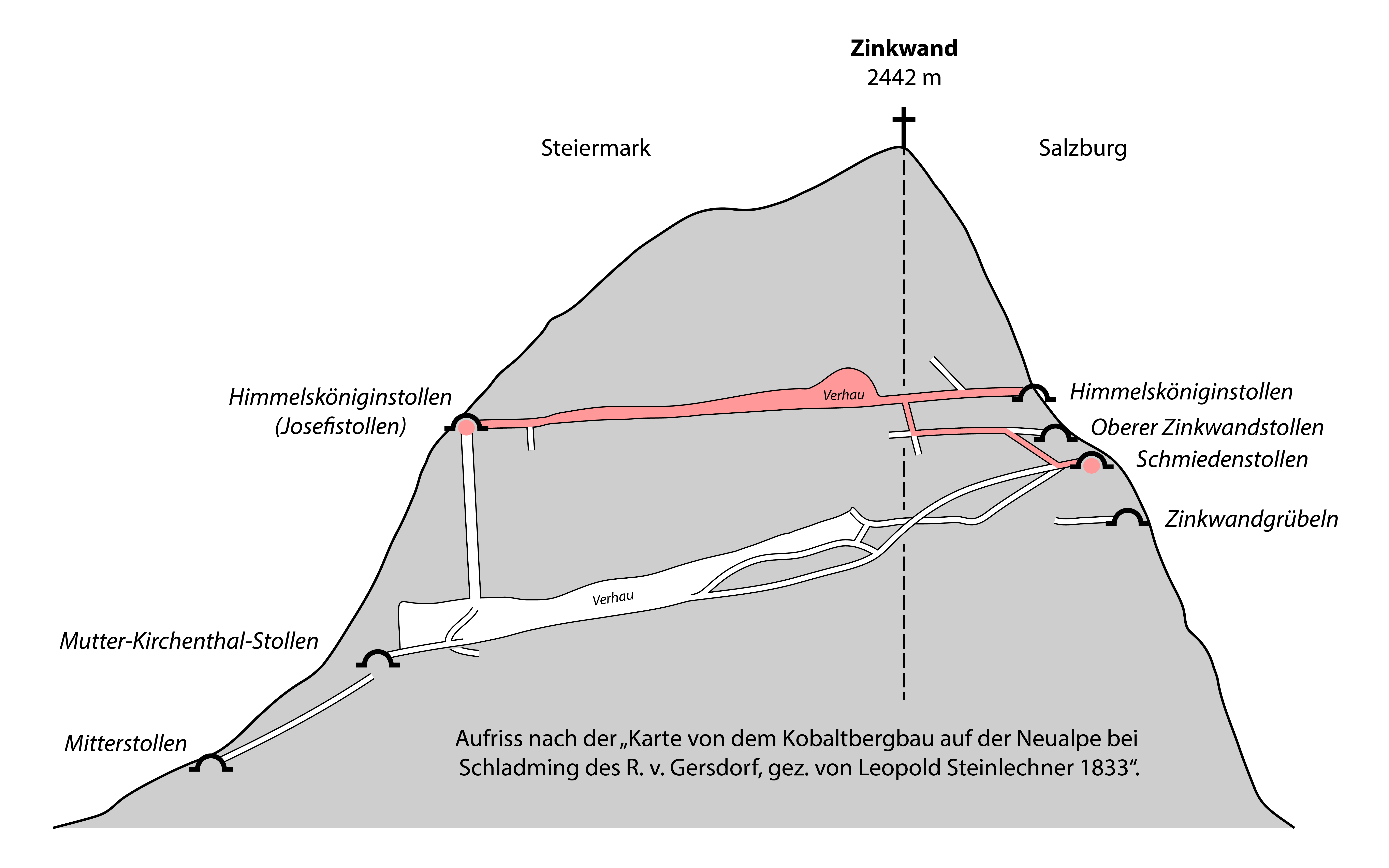 Zinkwandstollen in den Schladminger Tauern